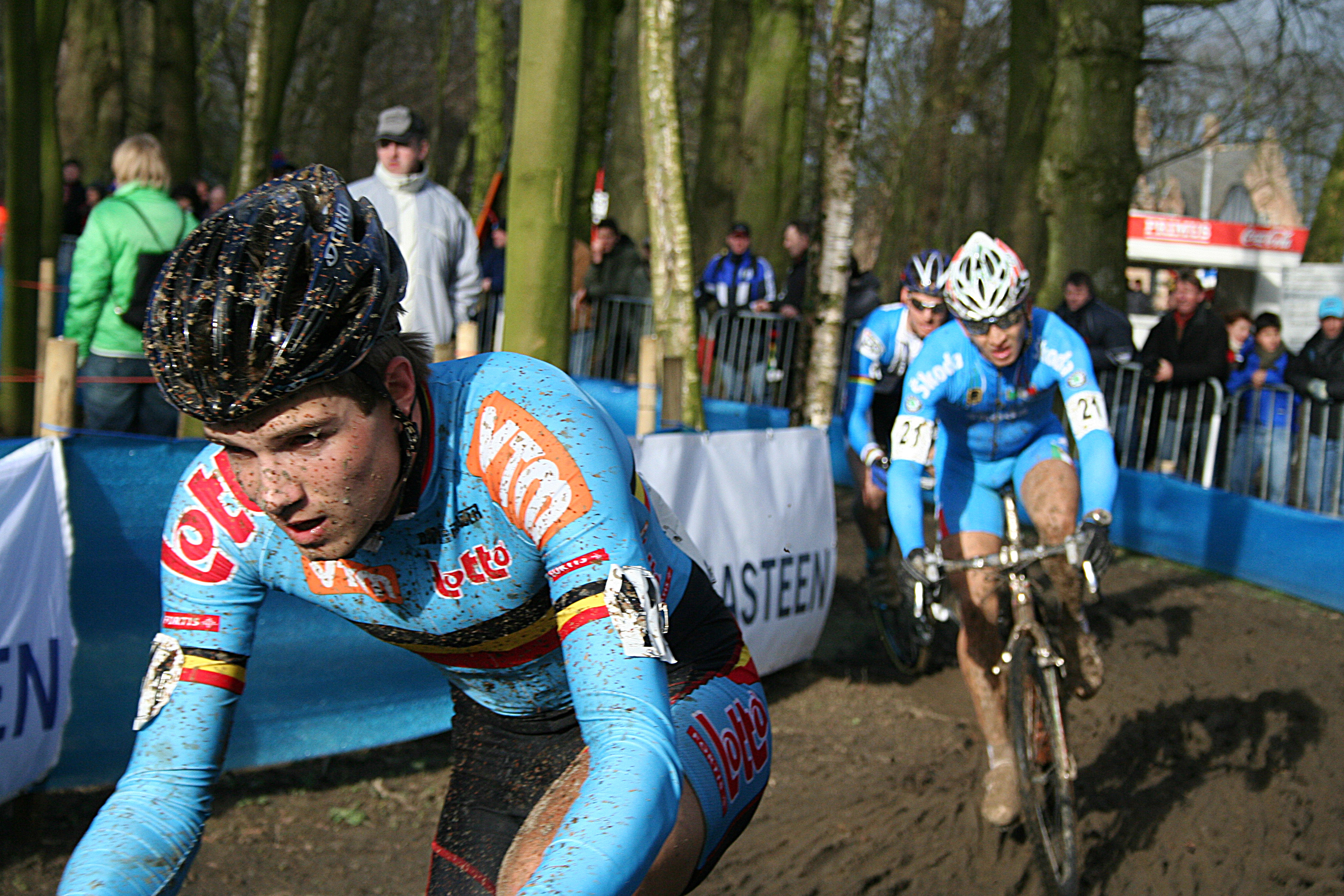 Niels Albert tijdens het WK veldrijden Hooglede-Gits 2007 Beloften